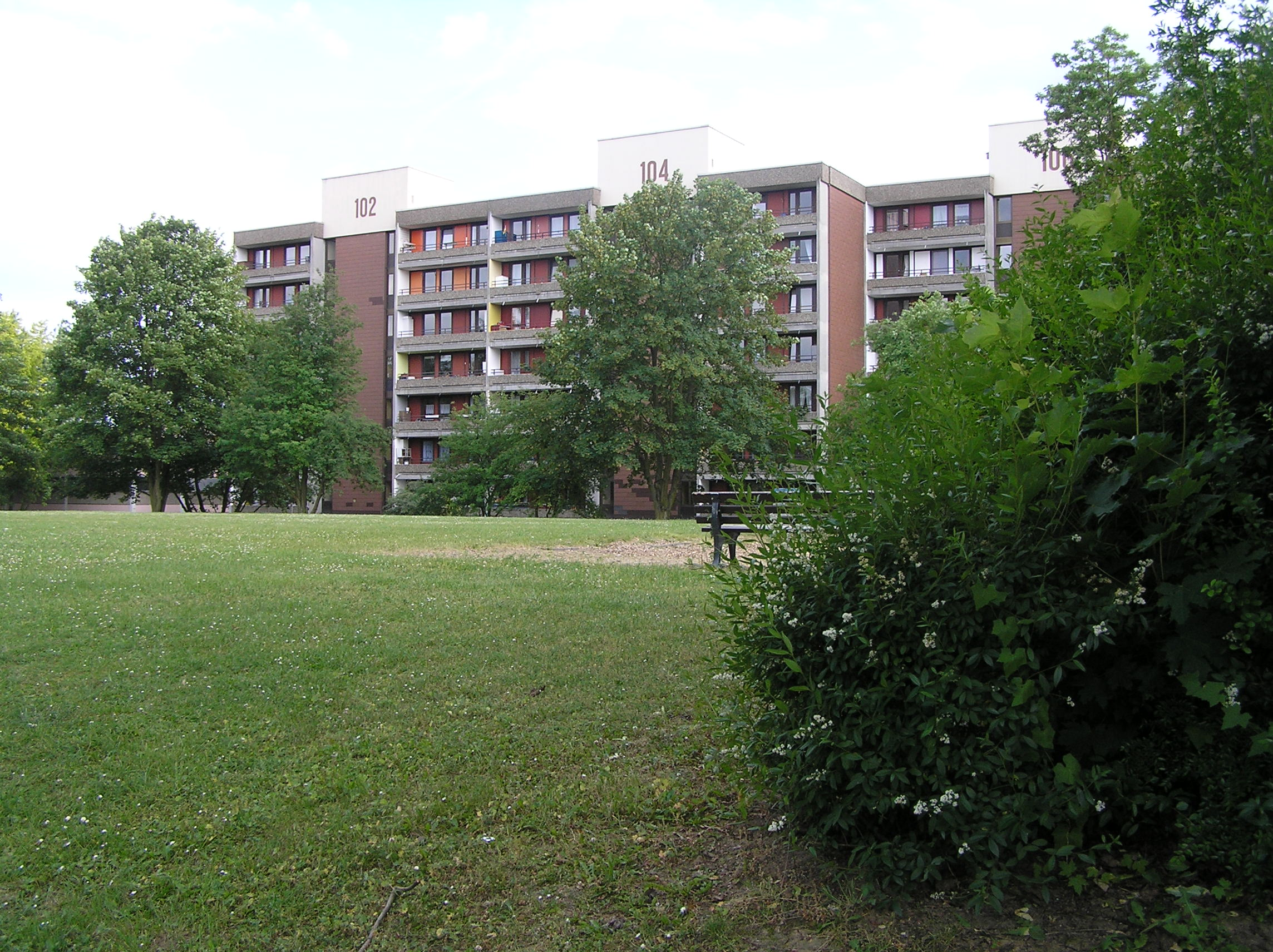 Wohnblocks am sozialen Brennpunkt "Ben-Gurion-Ring" in Frankfurt am Main, Stadtteil Niedereschbach